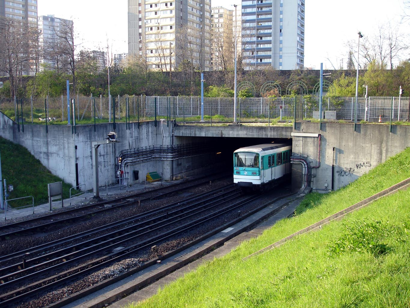 Rame MF 67 du métro sur la ligne 5 à Bobigny (Seine-Saint-Denis), France